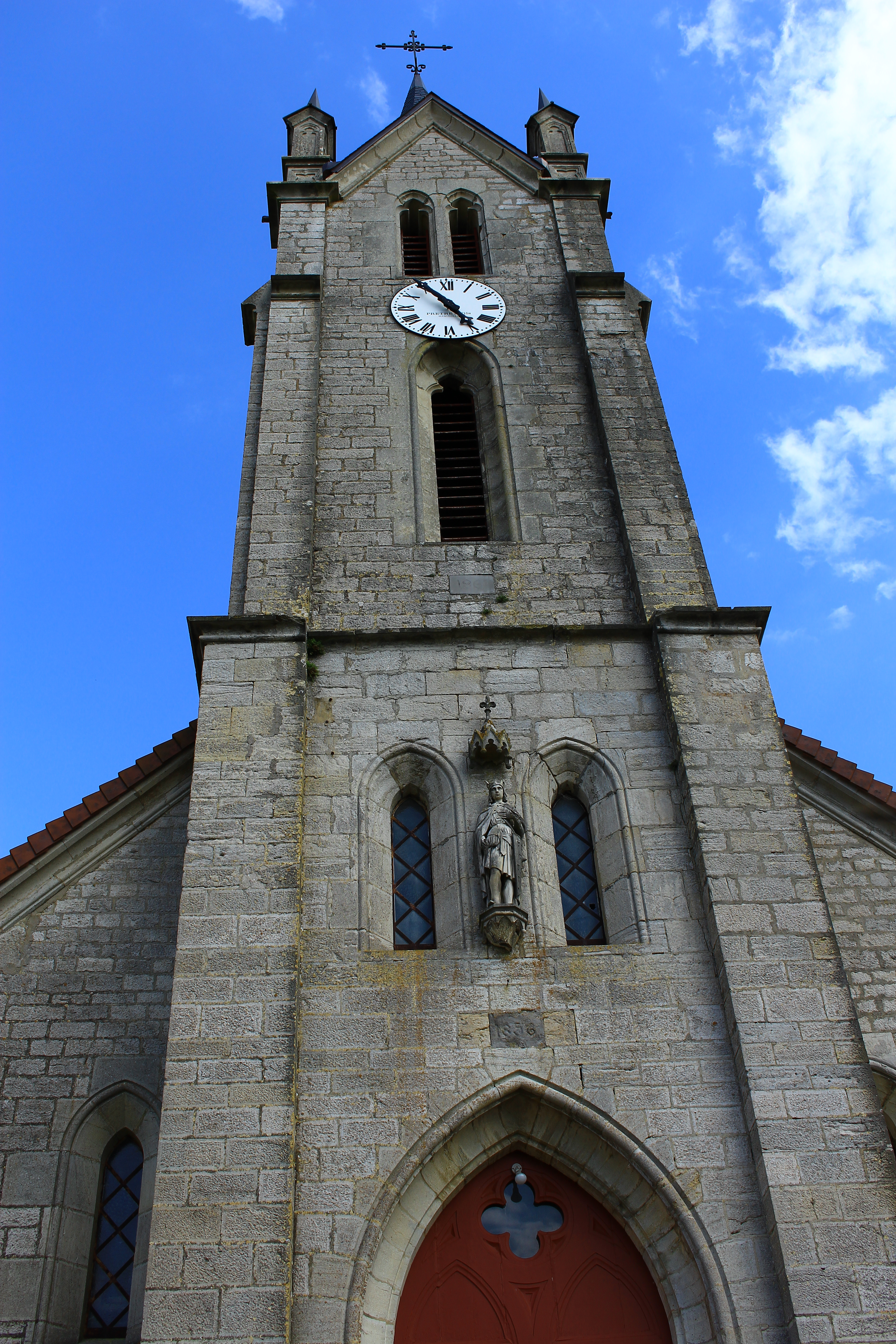 L'église de Molamboz (Jura) Mai 2016